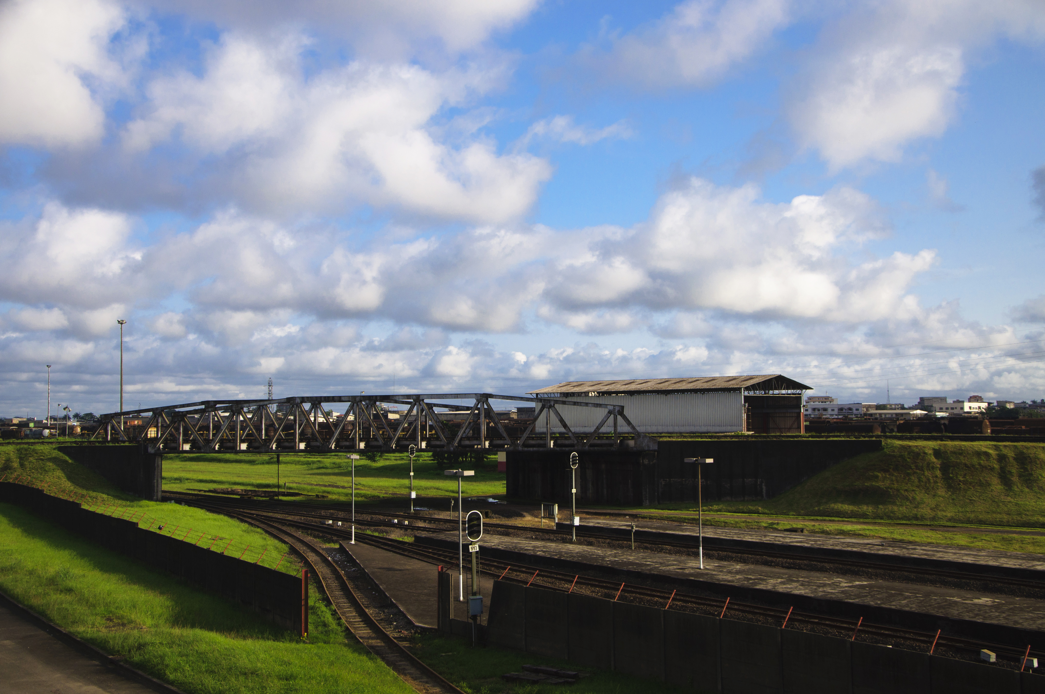 Gare de bessengue Douala. La beauté du paysage coté gauche de la gare souligné par le ciel bleu